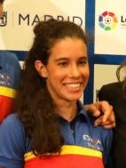 La decimocuarta edición de la Copa del Mundo de Triatlón se ha presentado hoy jueves, 18 de mayo, en el Ayuntamiento de Madrid, en un acto presidido por la coordinadora general de Cultura, Deporte y Turismo, María del Carmen Rojas, y en que también han participado José Hidalgo Martín, Presidente de la Federación Española de Triatlón y los deportistas olímpicos Míriam Casillas, Fernando Alarza y el doble campeón de Europa de Triatlón sub 23, David Castro, entre otras personalidades.